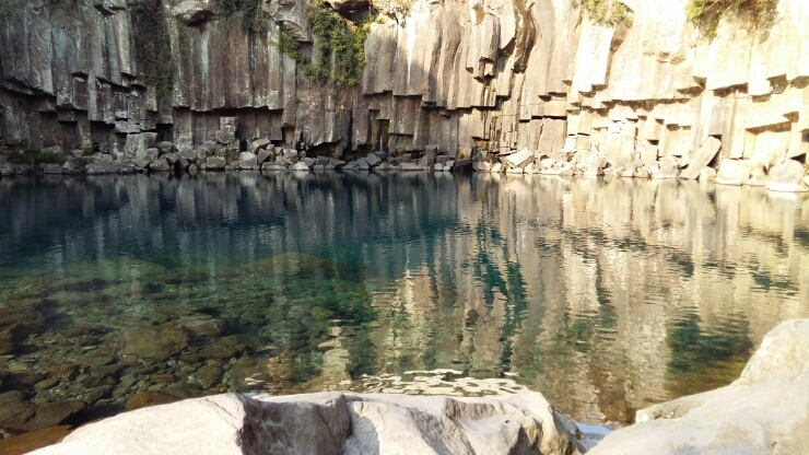 조선말: 제주도의 주상절리를 촬영함.